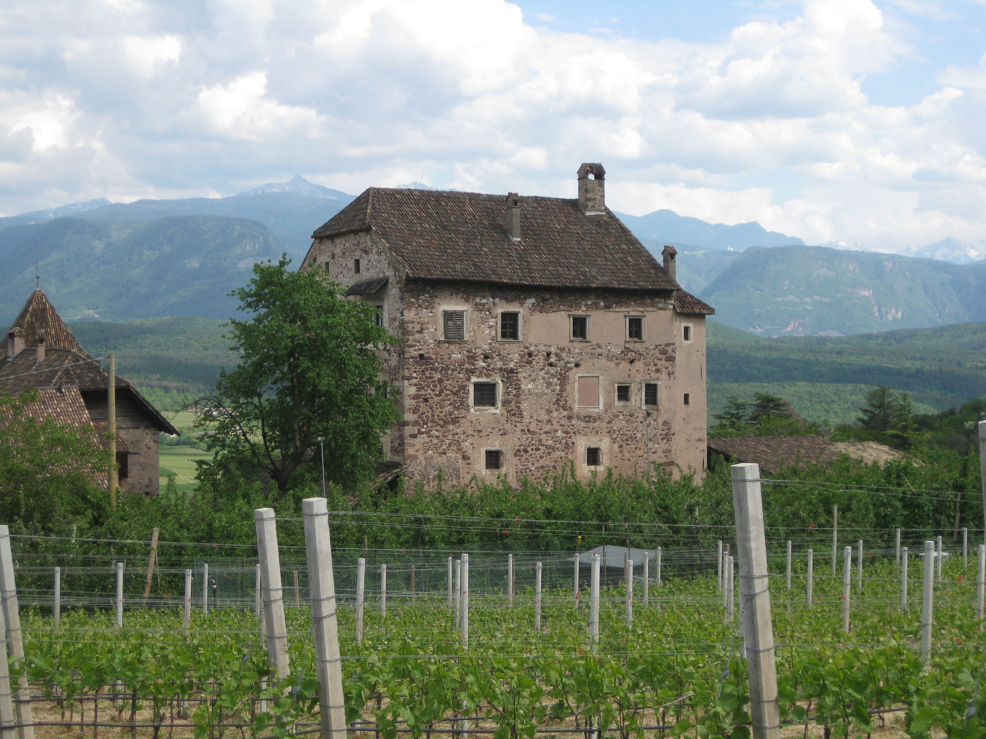 Ansicht des Ansitzes Moos (auch Schulthaus genannt) in Eppan in Südtirol (Westfassade)